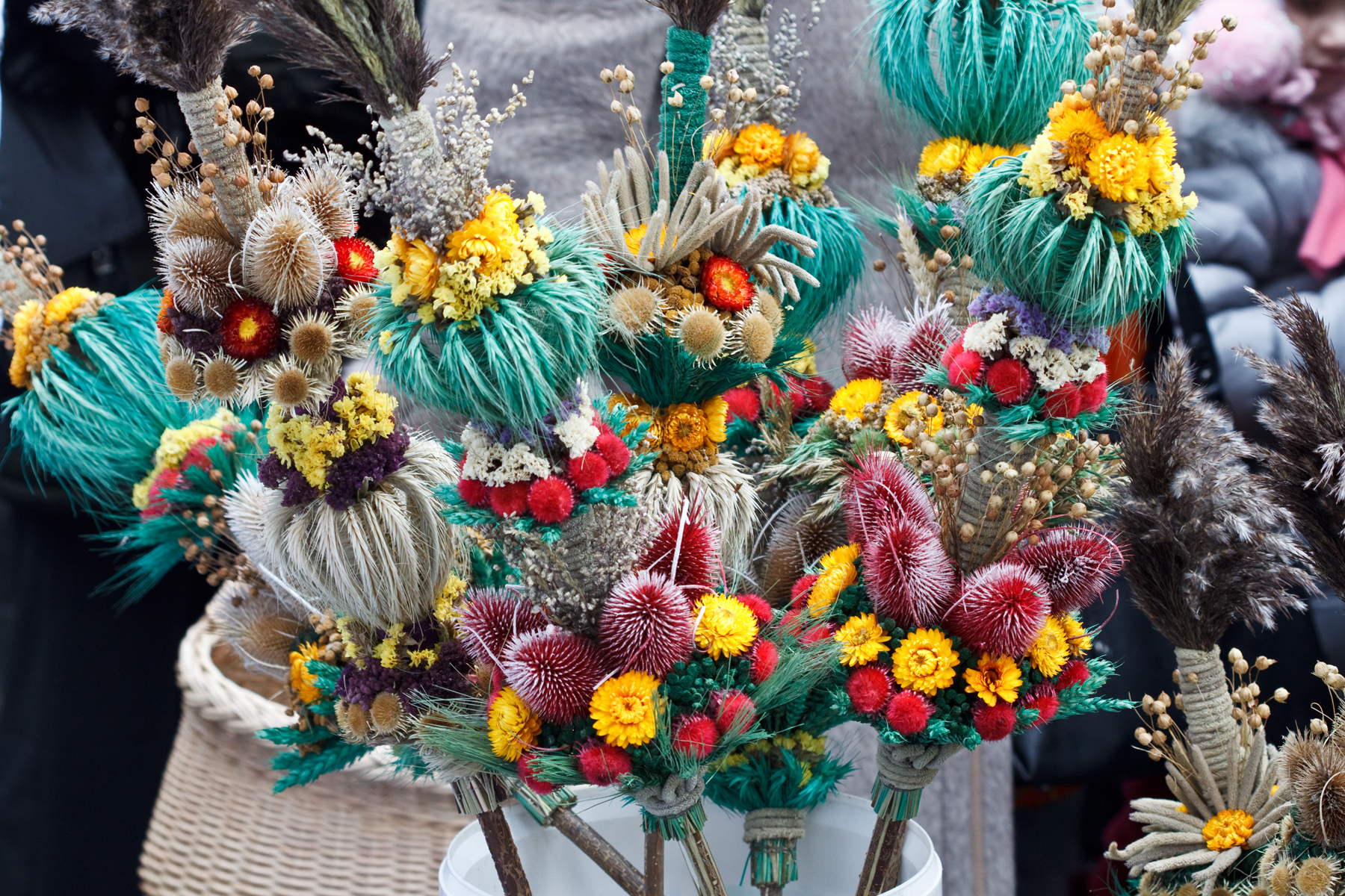 Kaziuko mugė #19